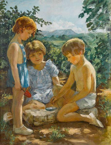 Les petits jardiniers